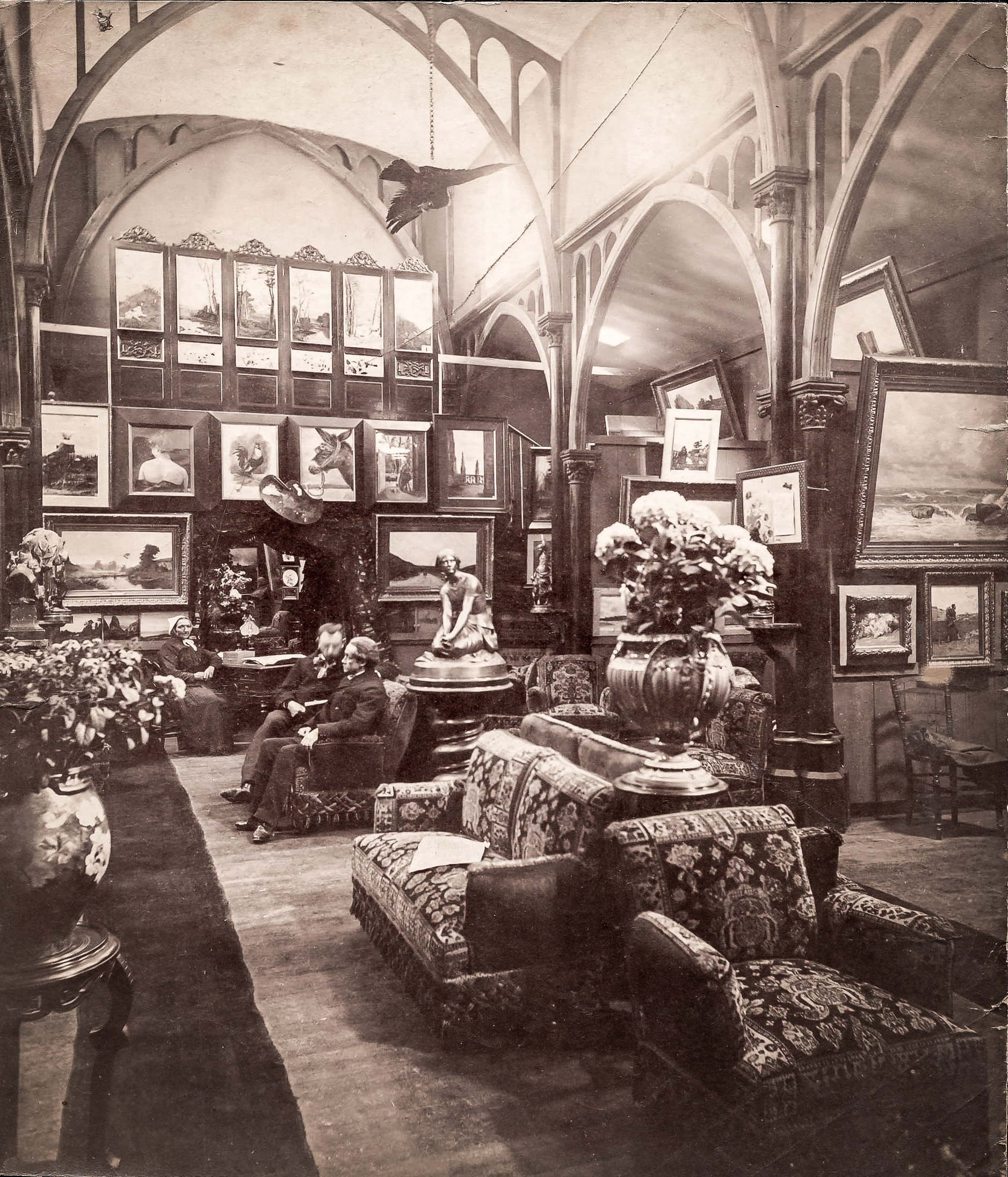 Salle d'exposition de l'ancien Musée des beaux-arts : vue des tableaux accrochés.